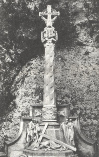 Conjunt escultòric del Via Crucis de Montserrat (1904-1916), de l'arquitecte Enric Sagnier, amb escultures d'Eusebi Arnau, compost per 14 estacions sobre la Passió de Crist, en un estil vagament gaudinià, perceptible a les superfícies rugoses de pedra repicada i als pinacles naturalistes. El conjunt fou destruït el 1936